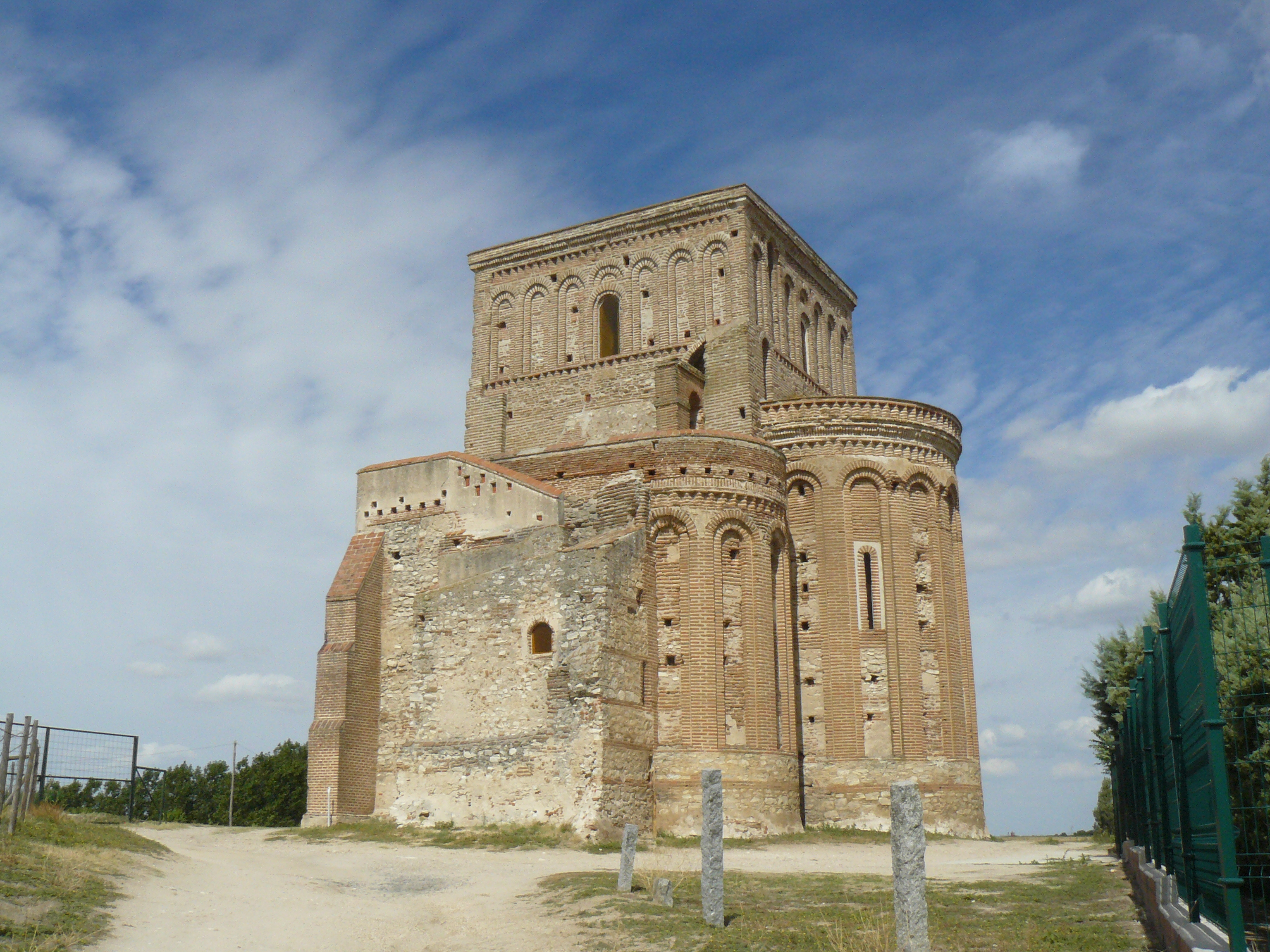 Ermita románico-mudéjar de la Lugareja, Arévalo, provincia de Ávila.